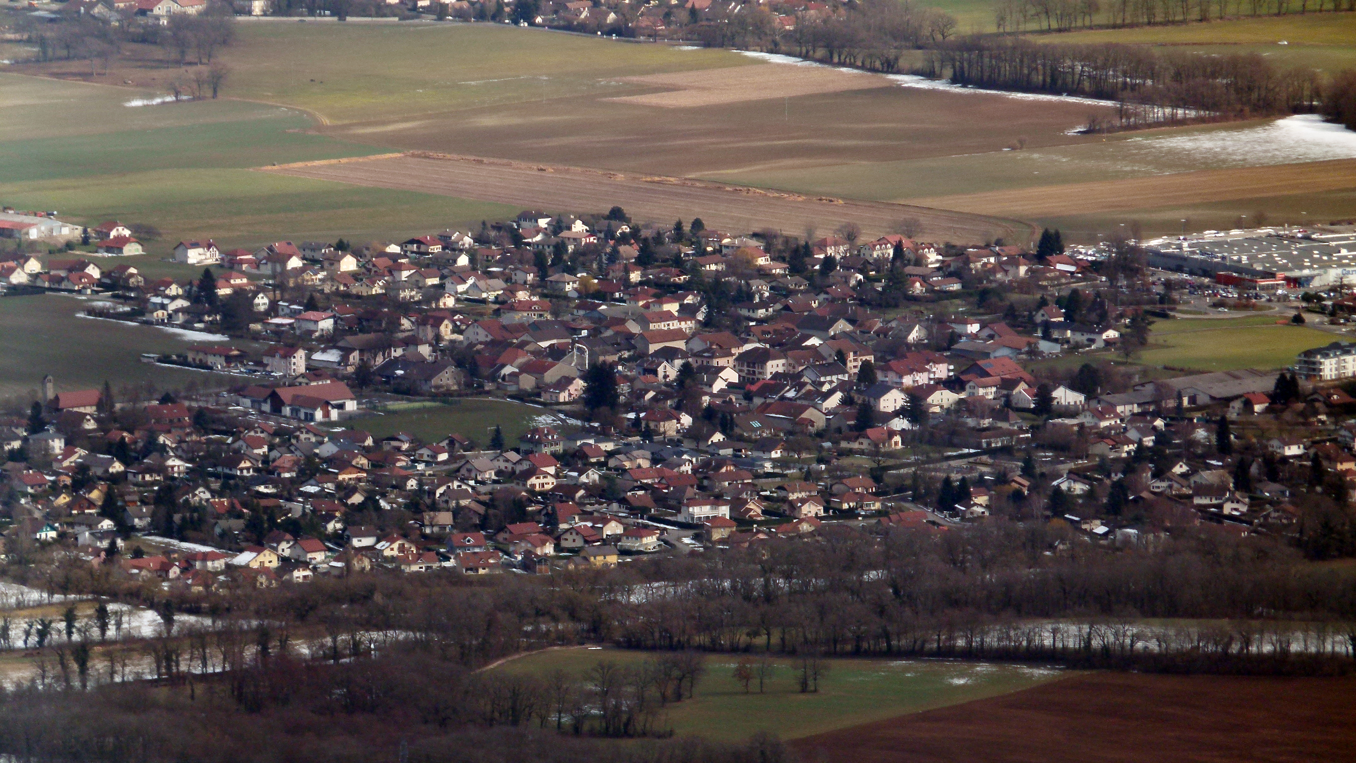 Ségny aus der Vogelperspektive, Gemeinde im französischen Département Ain